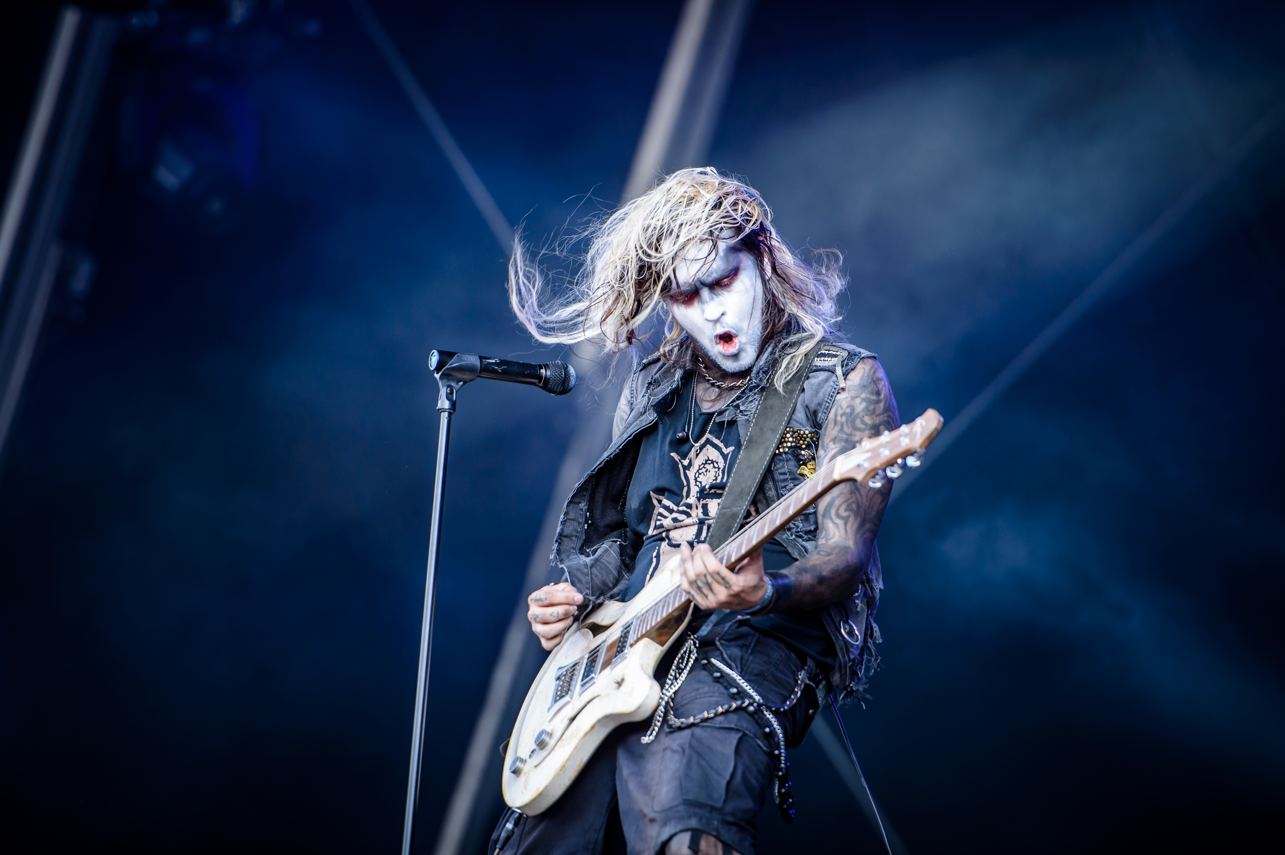 'RockHarz Open Air 2017; Ballenstedt': 'Lord of the Lost'